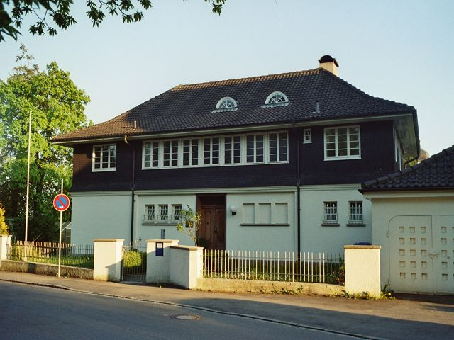 Denkmalgeschützte Villa Winz in der Schmidstraße 7 in Friedrichshafen. Baustil: Englische Landschaftsarchitektur. Erbaut: 1915, bewohnt von Zeppelin-Luftschiffbau-Prokurist, ZF- und Maybach-Geschäftsführer Theodor Winz